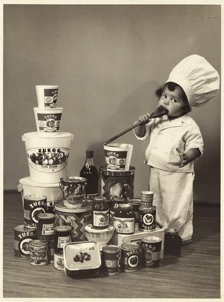 bambino con confetture verticale